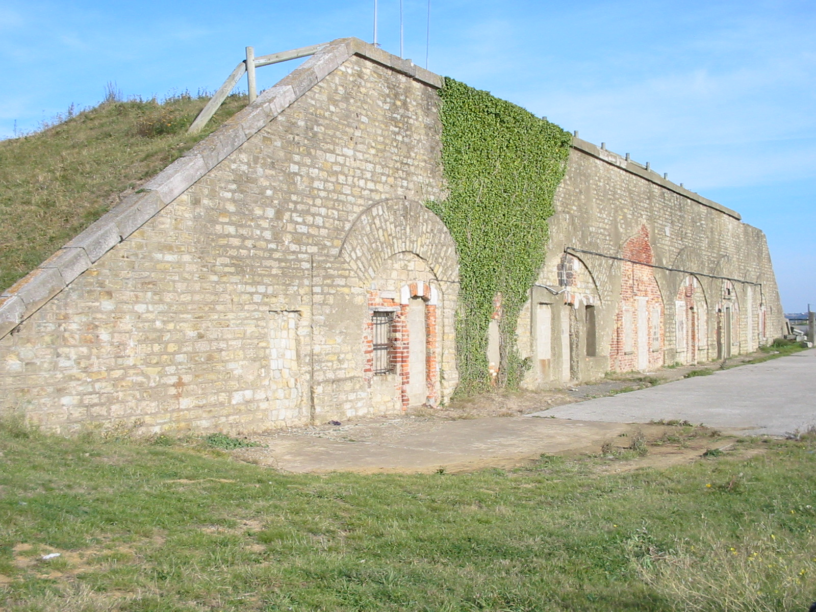 Photo personnelle (J.Capez)du Fort de Couppes à le Portel Plage- Fort datant années 1870. (Ouvrages Séré de Rivières)